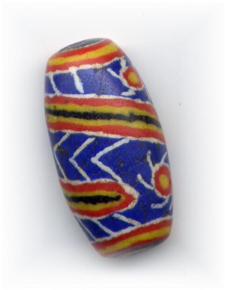 Kiffa bead cylinder.